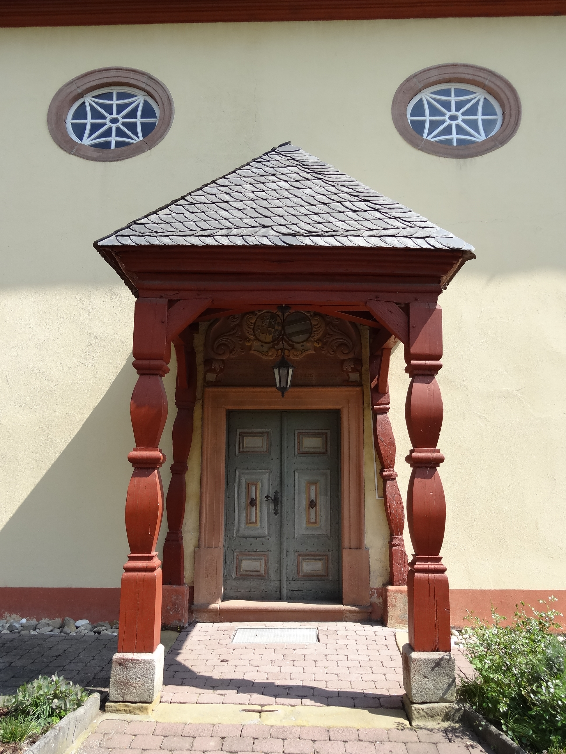 Evangelische Kirche Ober-Hörgern